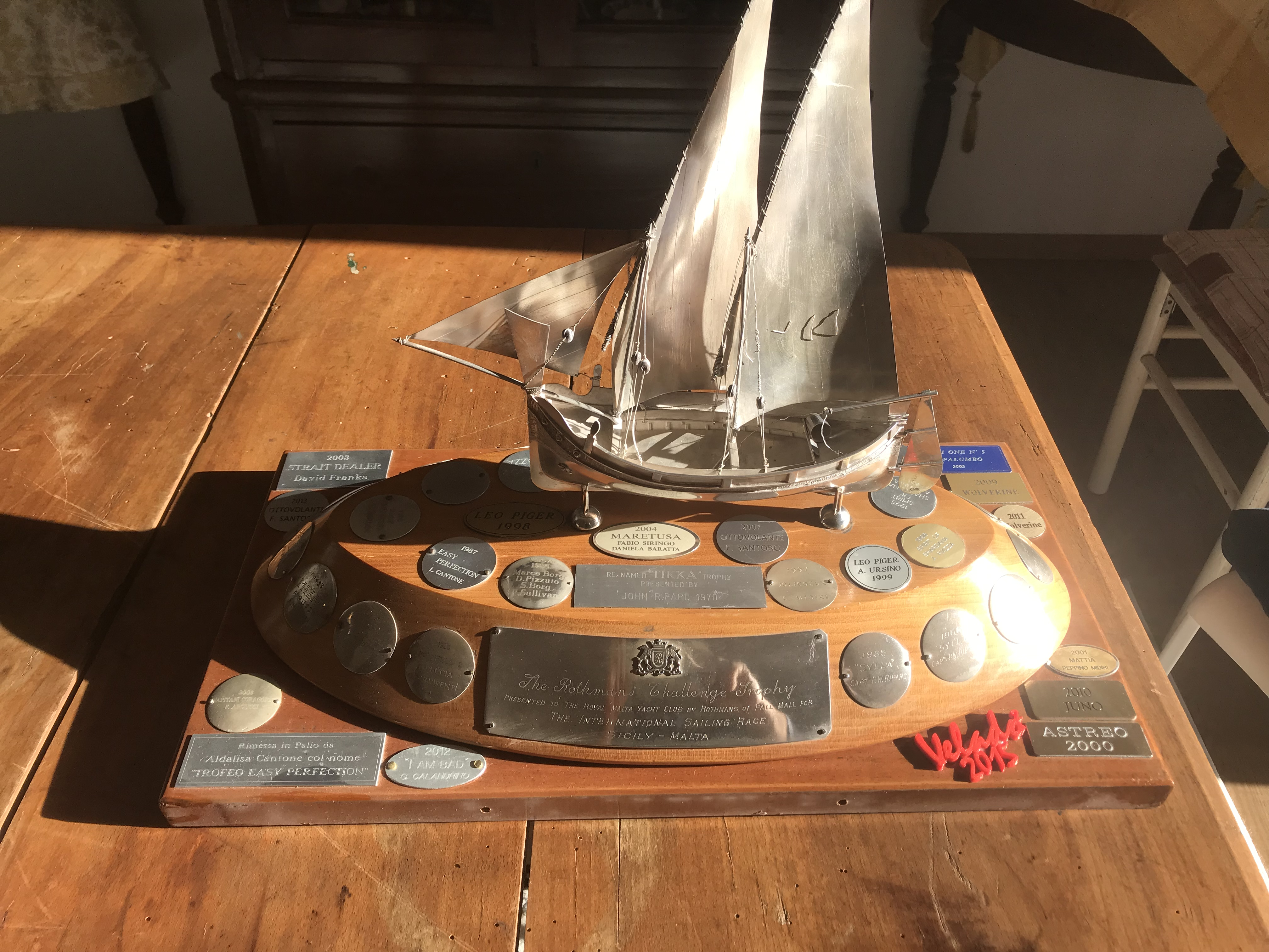 Rothmans Thophy